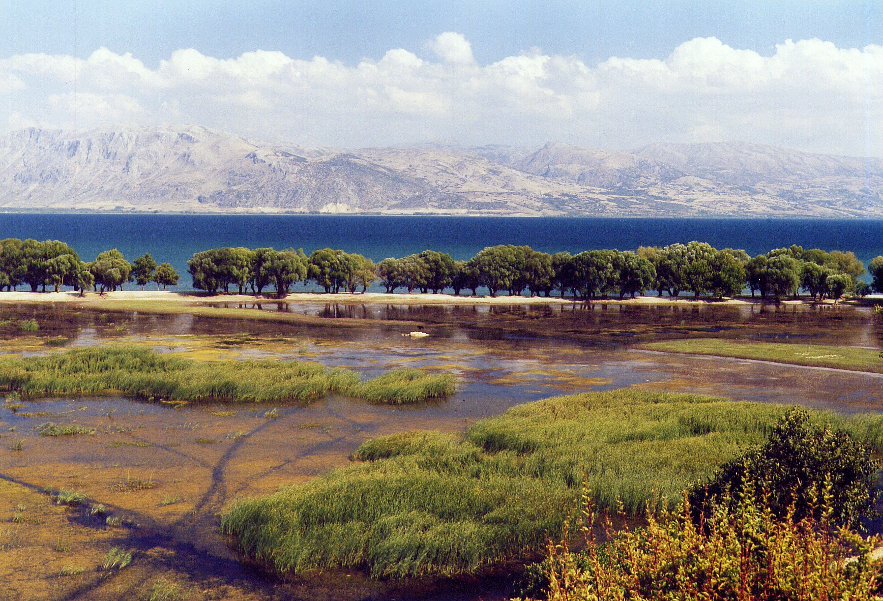 Eğirdir-See, Türkei